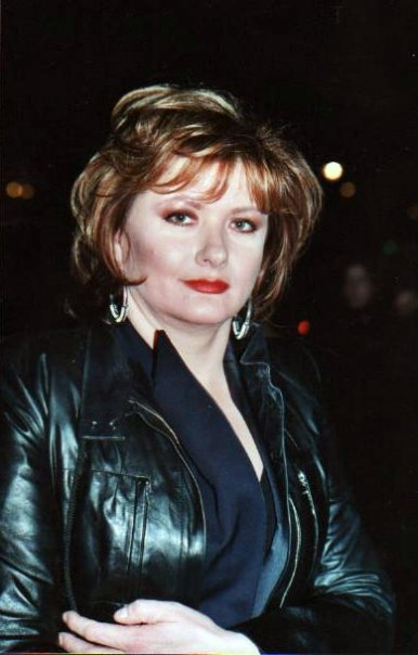 Catherine Jacob à la cérémonie des Césars